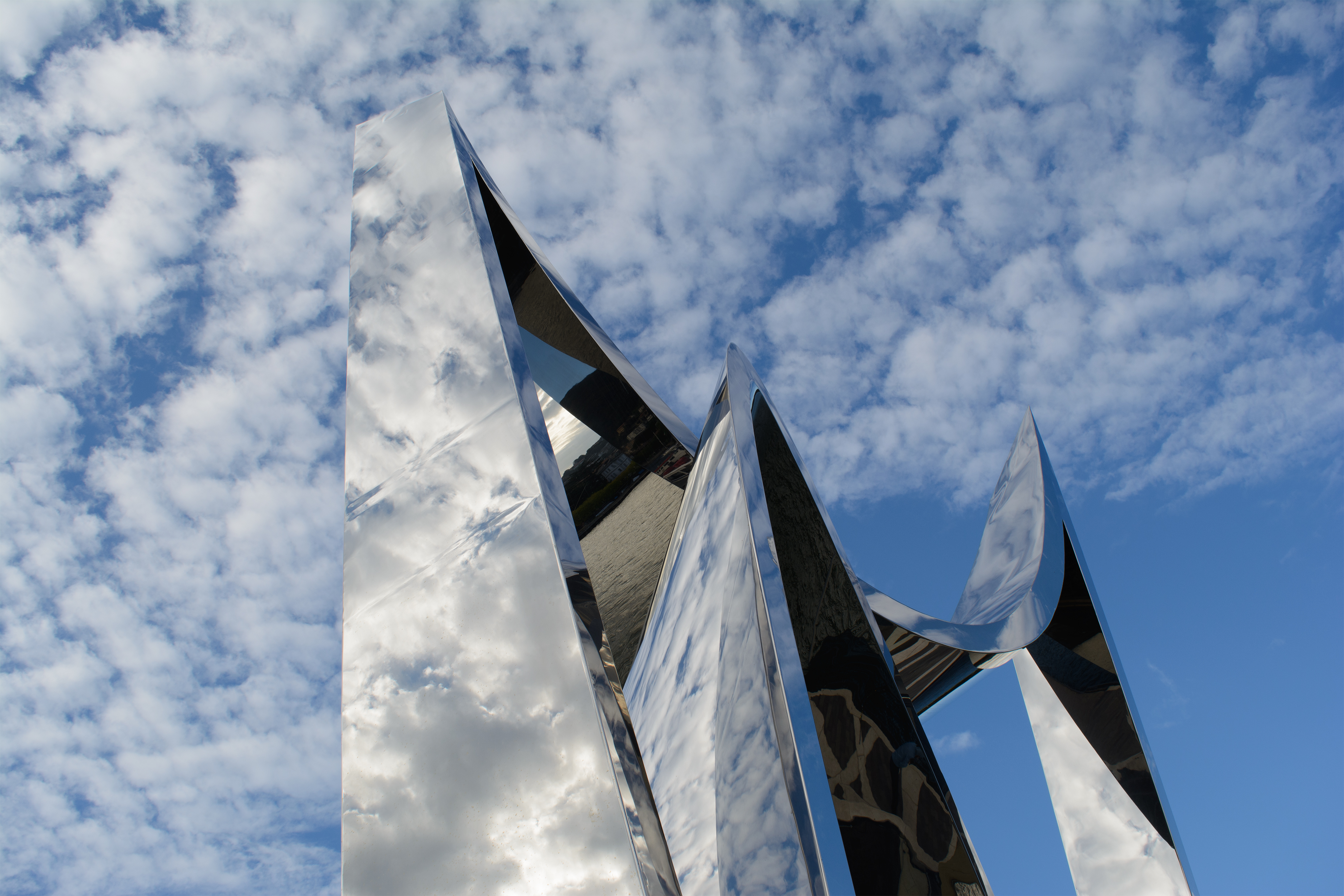 The Life Electric This is a photo of a monument which is part of cultural heritage of Italy.